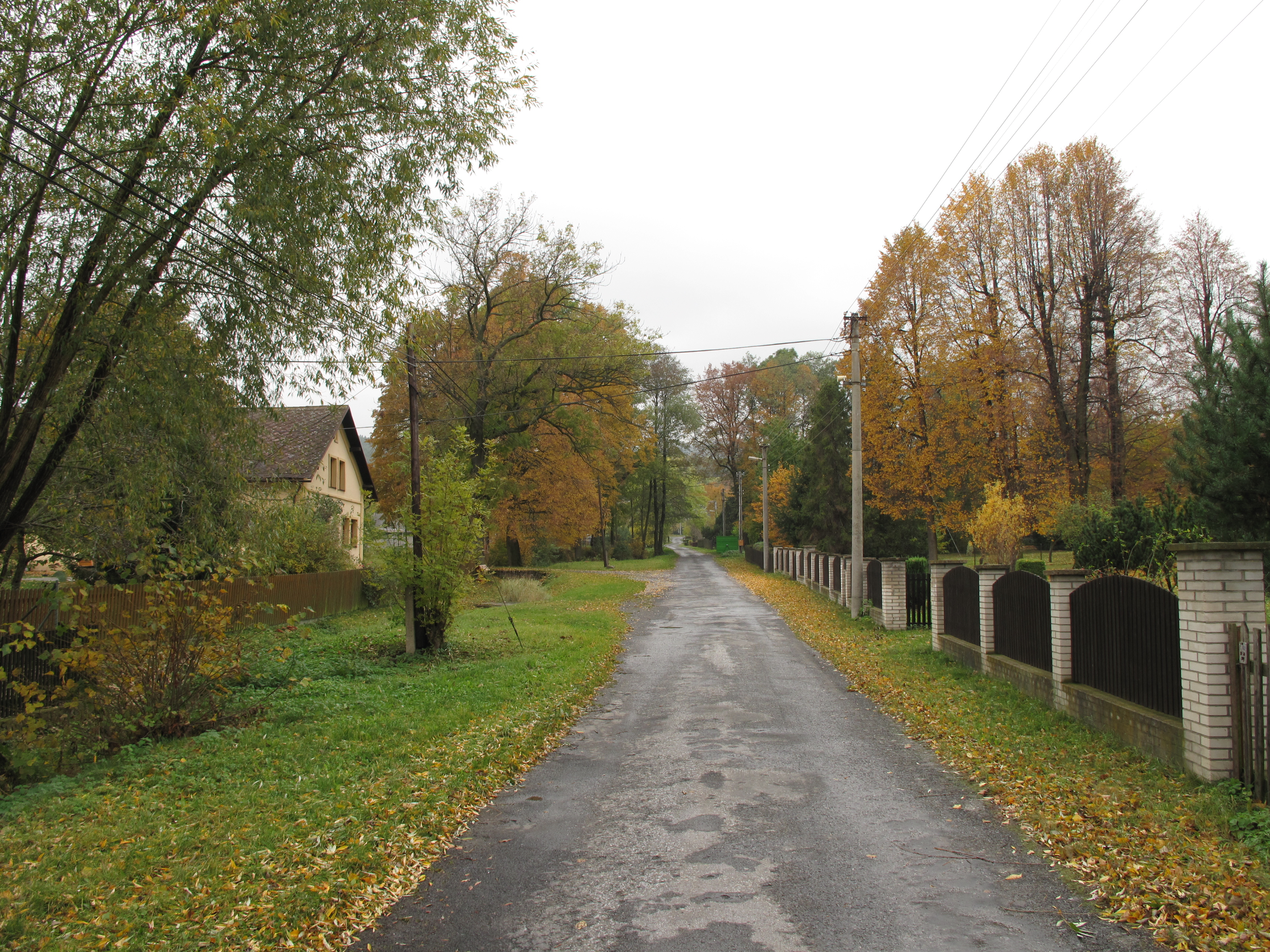 Bučávka. Okres Bruntál, Česká republika.